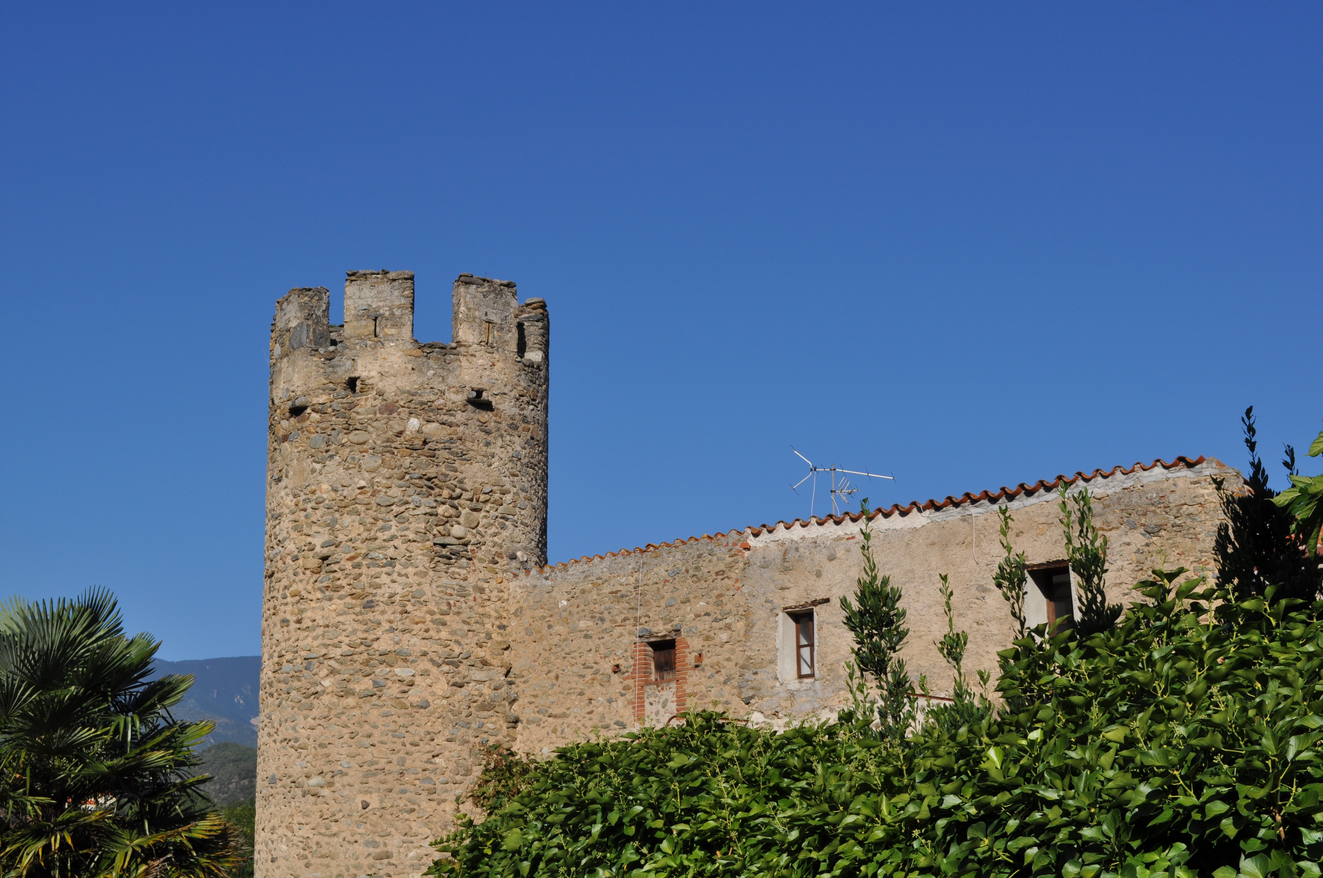 Remparts de Codalet, (Inscrit, 1949) .